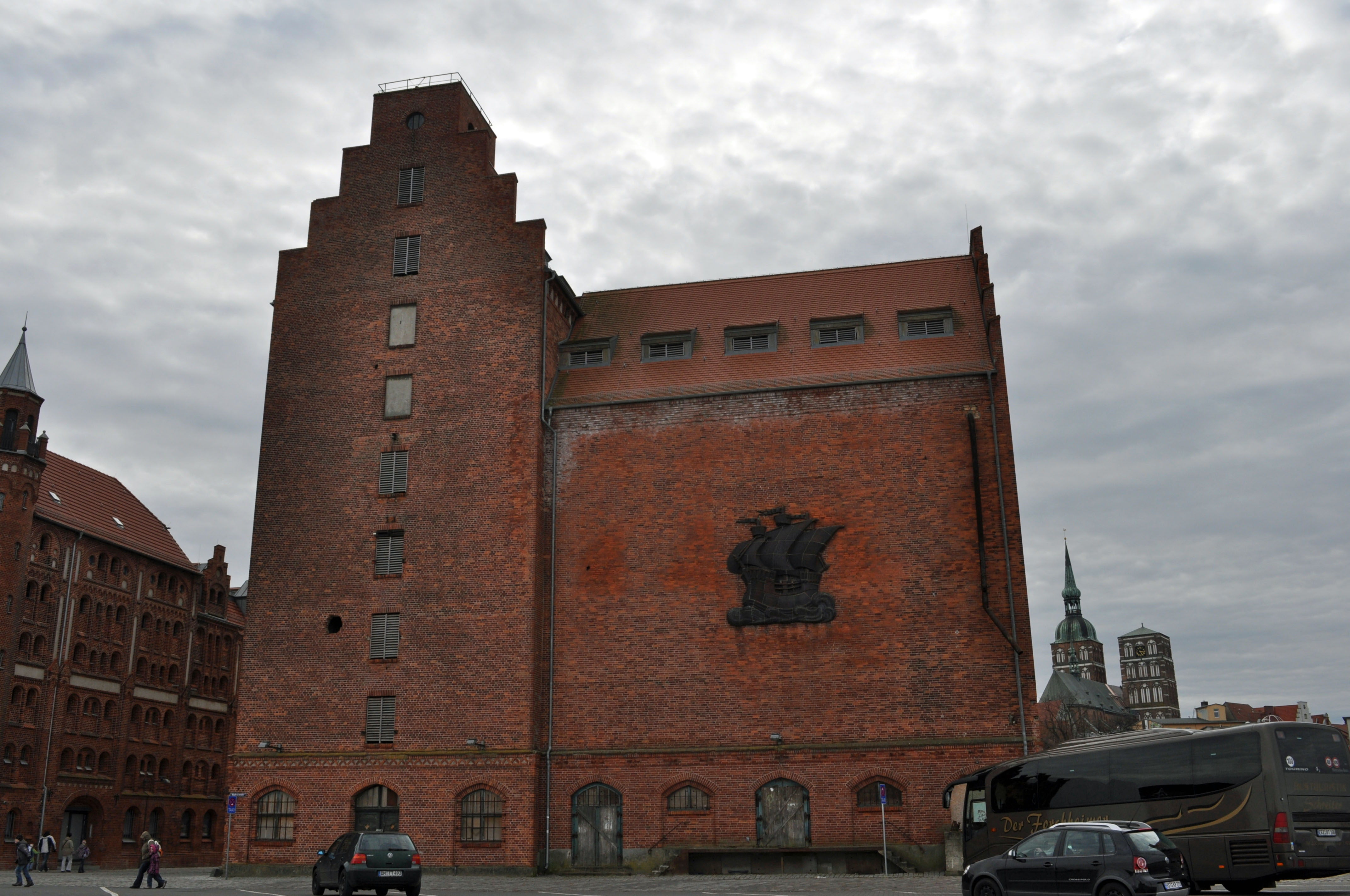 Gebäude bzw. Gebäudedetail in Stralsund. Straße und Hausnummer siehe Dateiname.